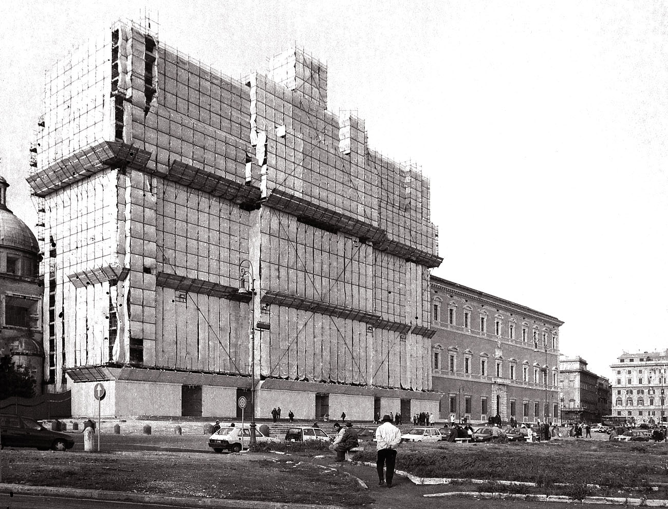 La Basilica durante i restauri del 1999